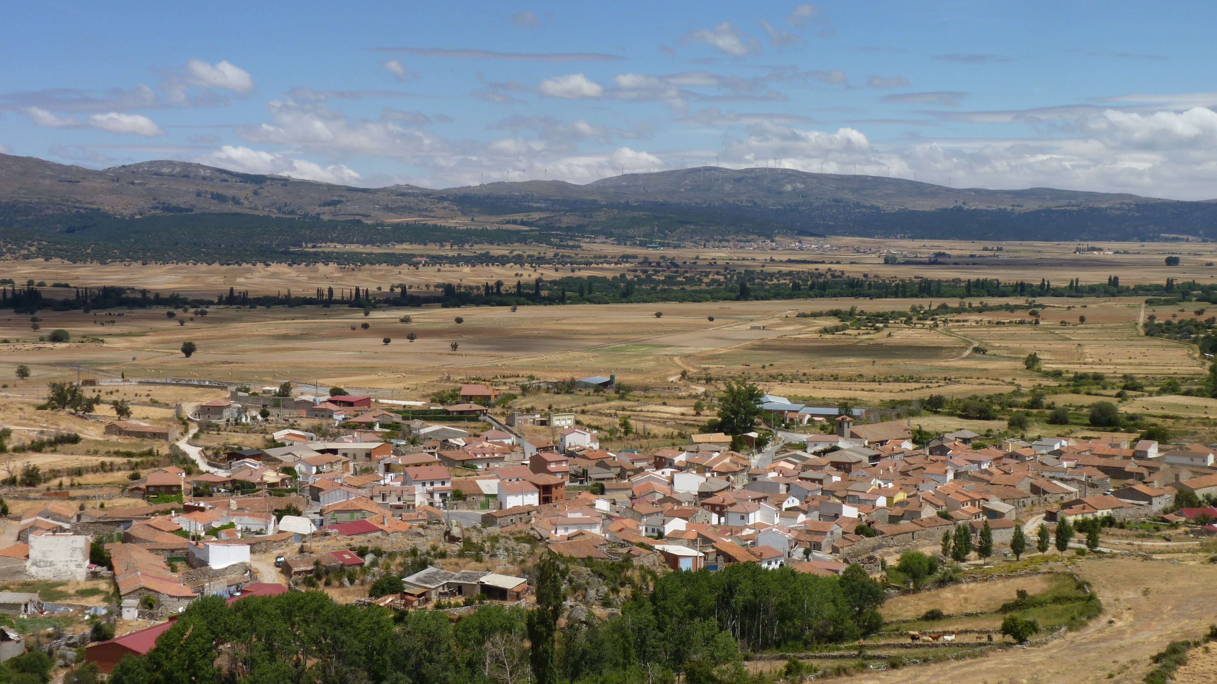 Vista general de Muñotello desde el pandero